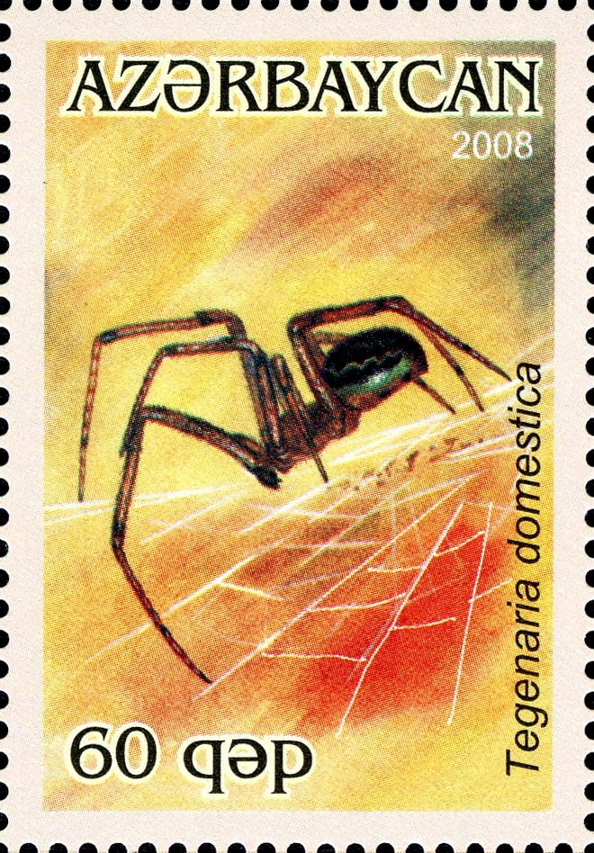 Hörümçəkkimilər.